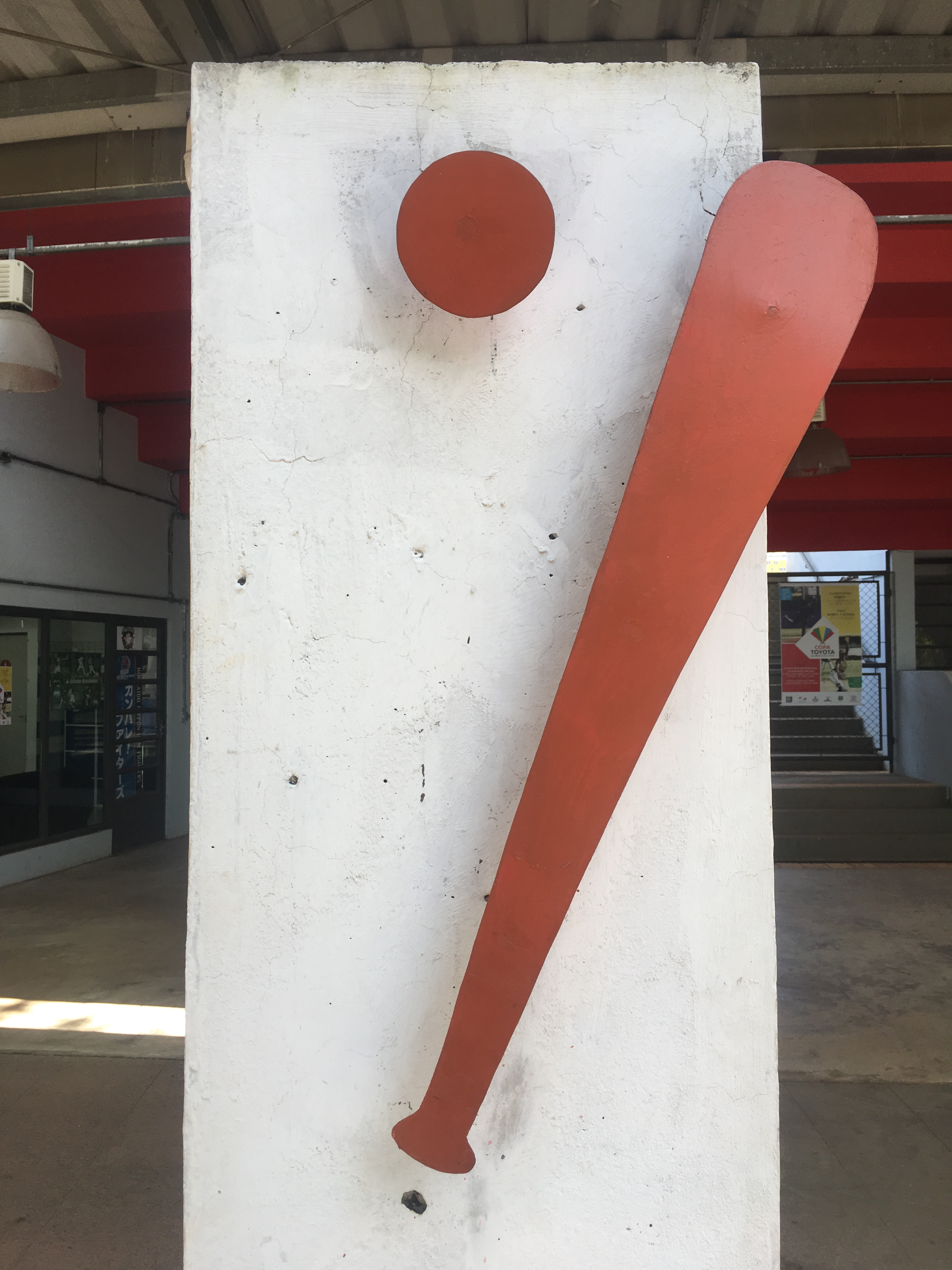 Estrutura da entrada principal do Estádio Municipal de Beisebol Mie Nishi, em São Paulo (SP).